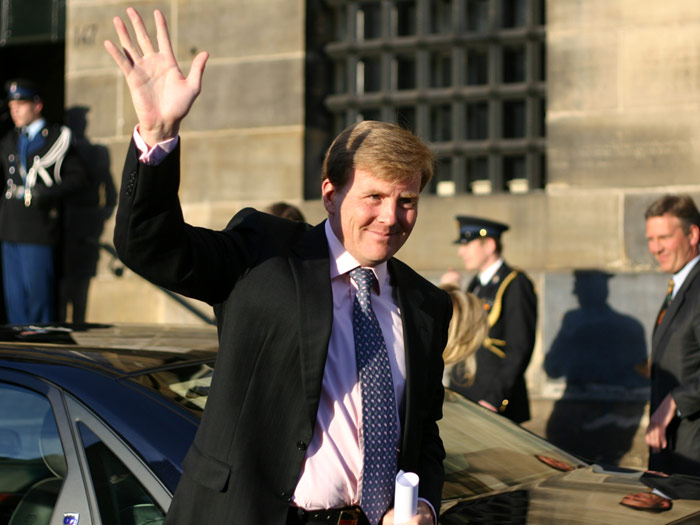 Willem-Alexander der Nederlanden.jpg